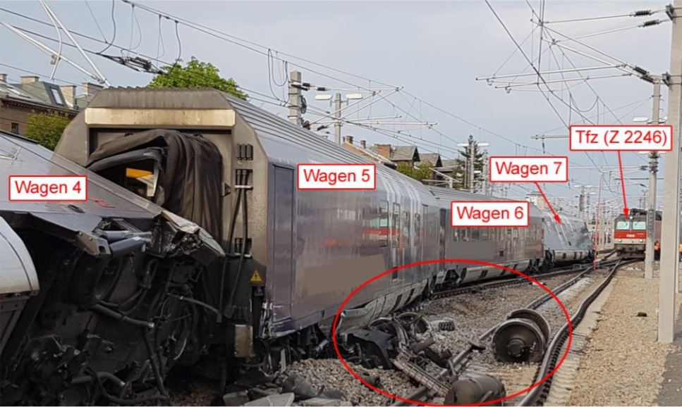 Am 15. April 2017 in Meidling verunfallter Doppelstock-Wendezug. Rot markiert die herausgerissenen Achsen des vierten Wagens des Railjet.